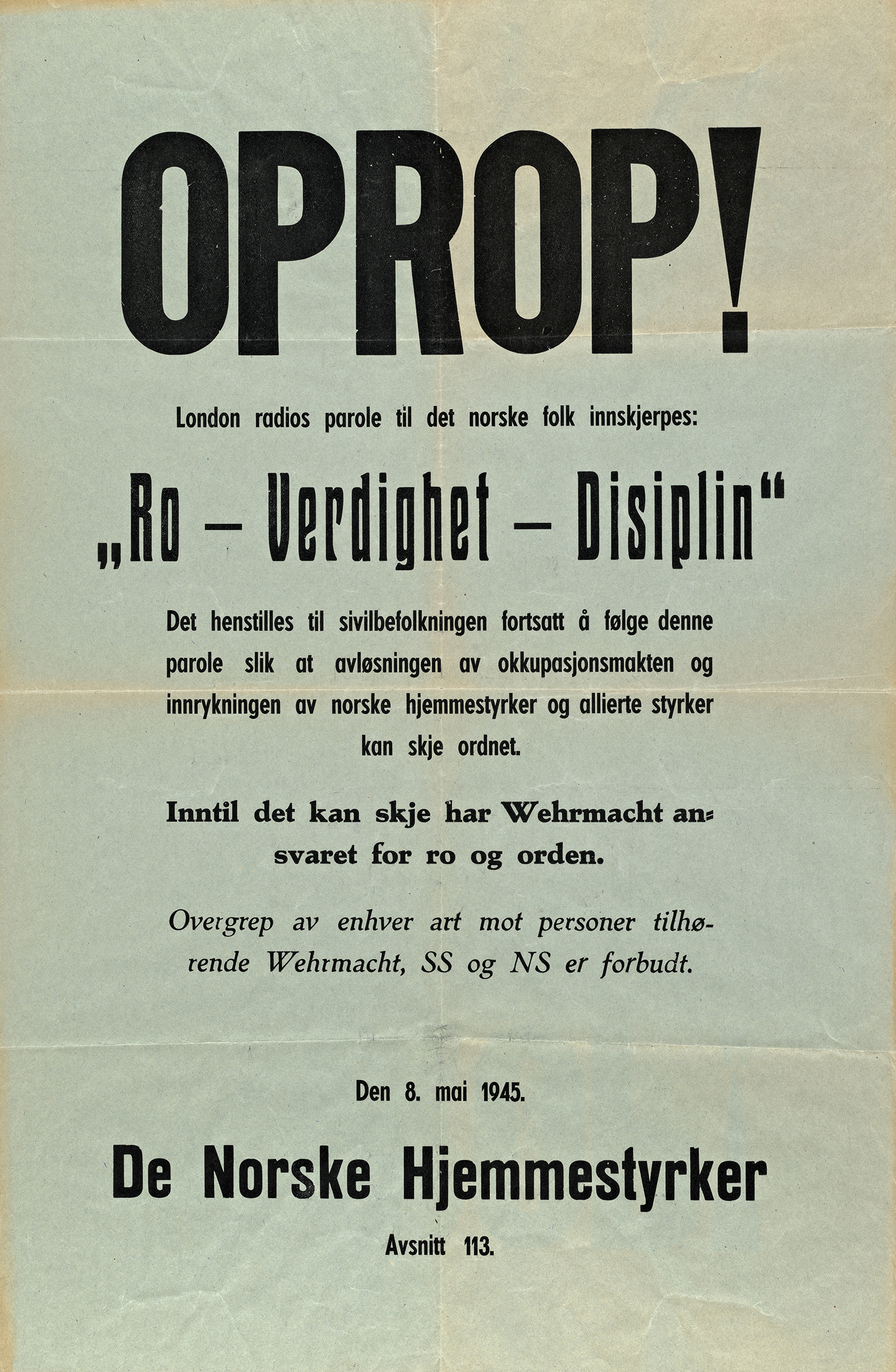 Bildet er hentet fra Nasjonalbibliotekets plakatsamling